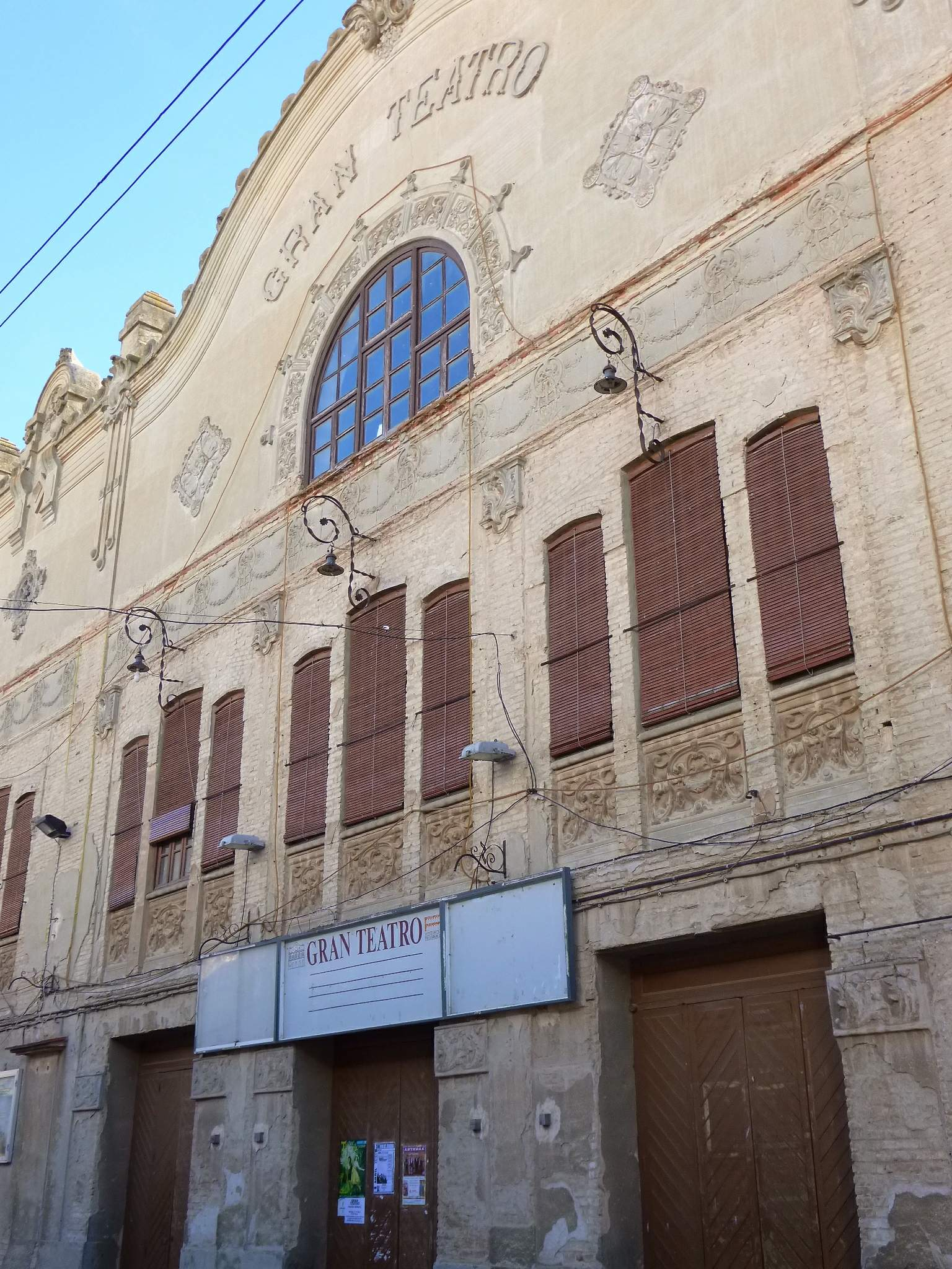 Gran Teatro de Villarrobledo (Albacete)